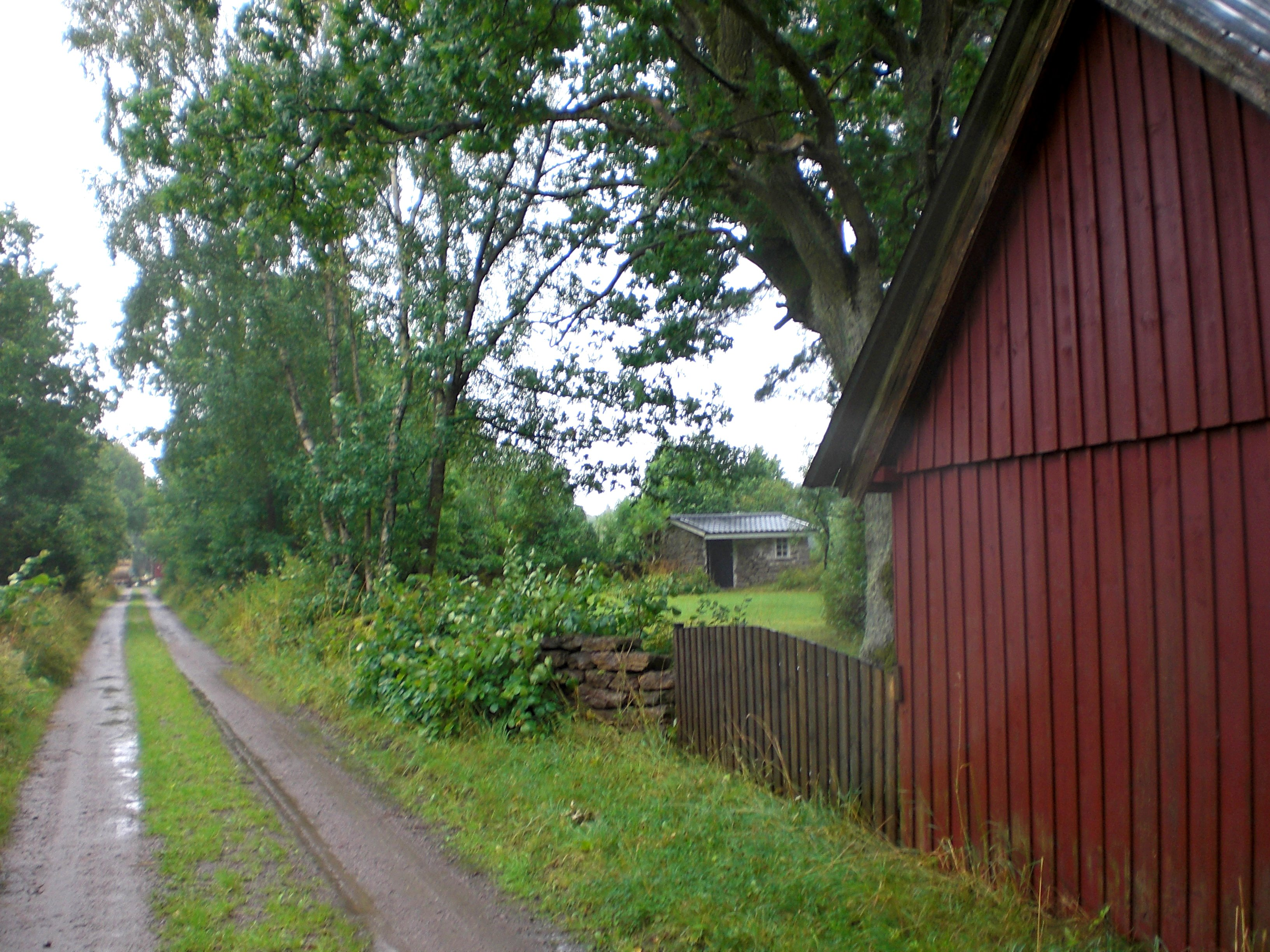 Weg durch Österskog auf Öland in Schweden